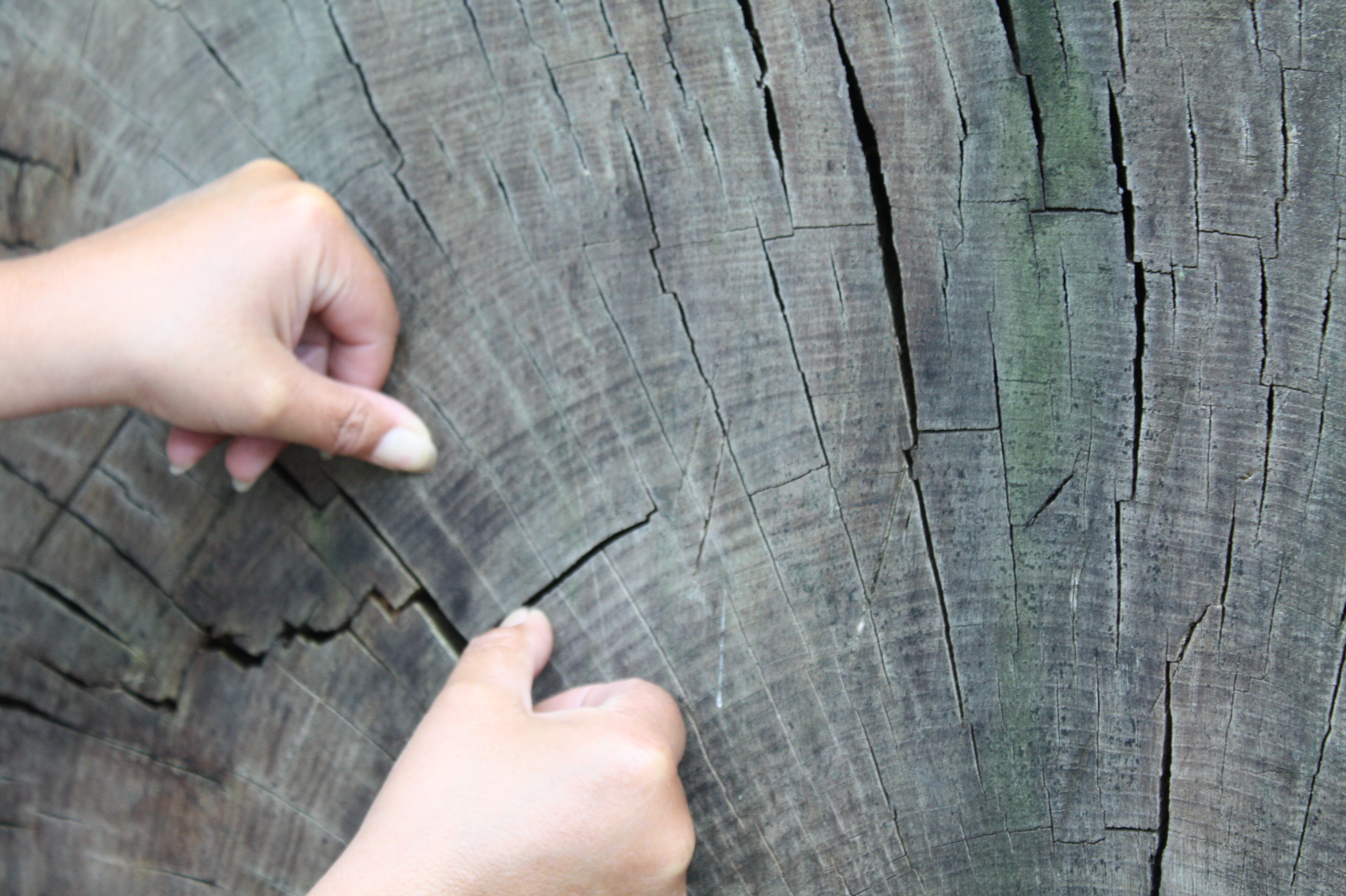 Fraga de Catasós (Lalín). Detalle da sección do tronco de castiñeiro, derrubado en 1984 cunha idade de 270 anos